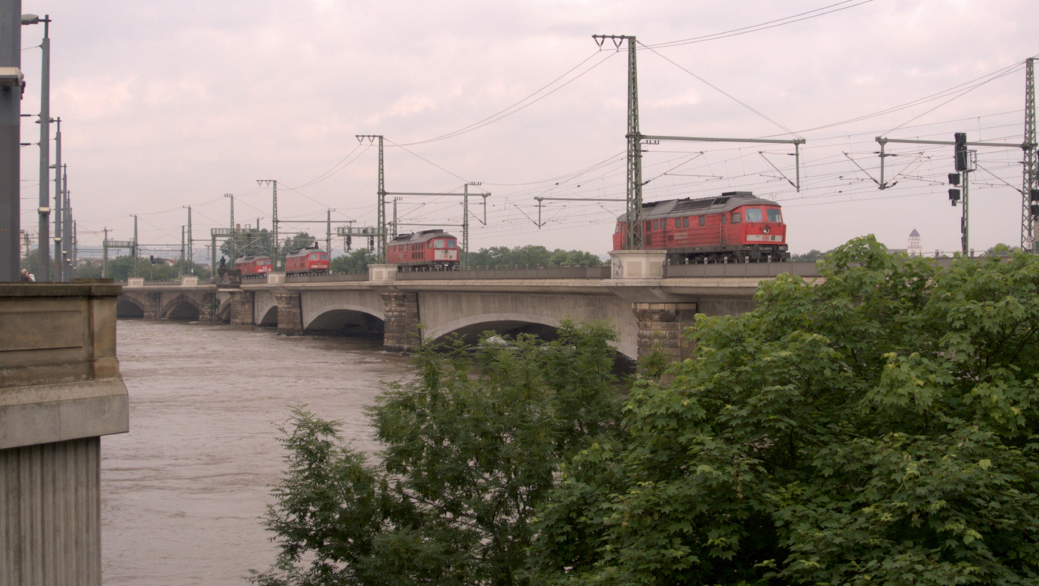 Marienbrücke (Dresden) während der Flut am 7.6.2013 um 9:00 Uhr